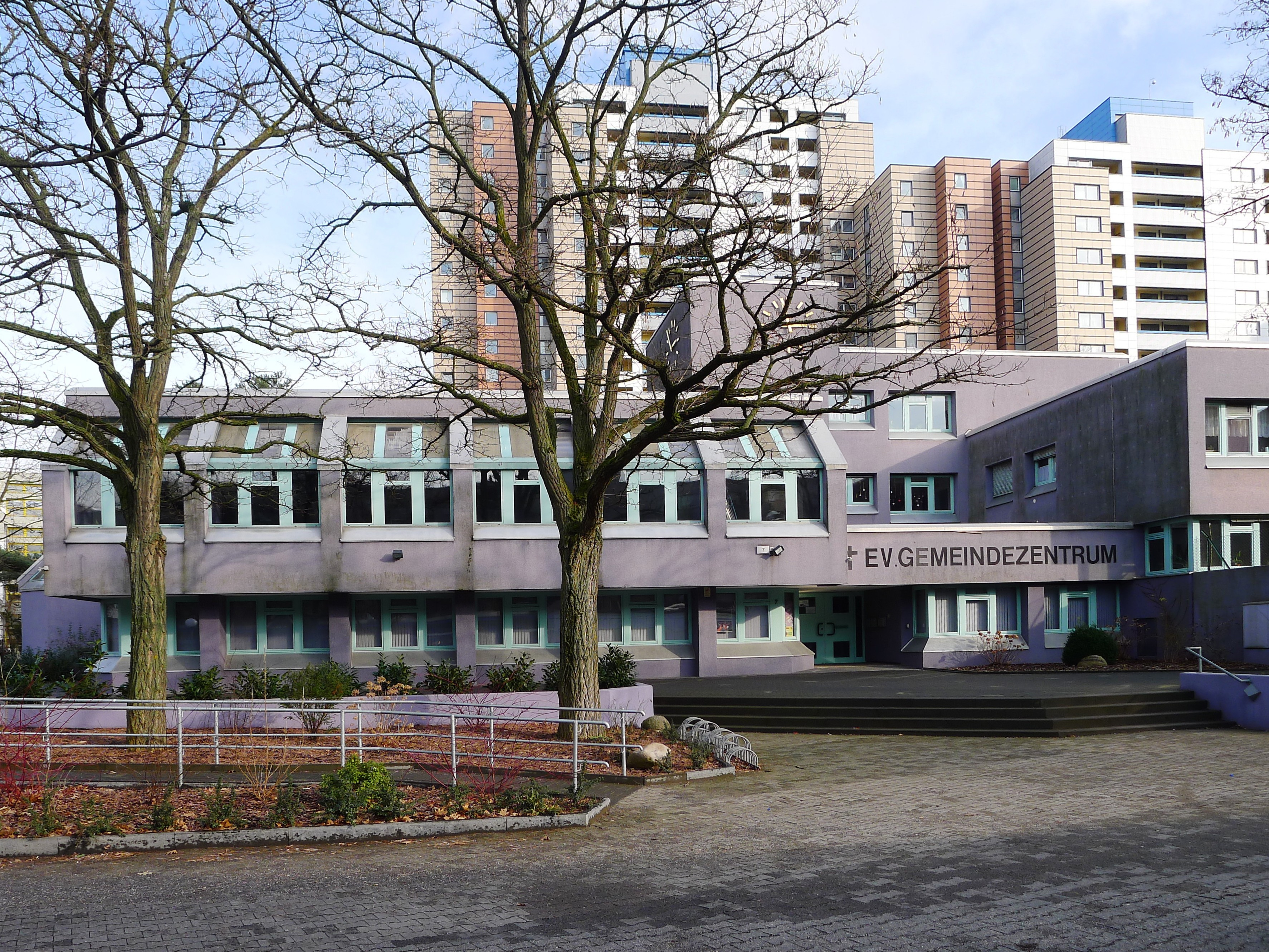 Blick auf das Gemeindezentrum